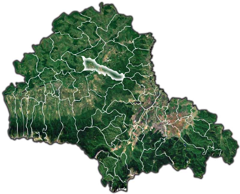 Comana jud Brasov